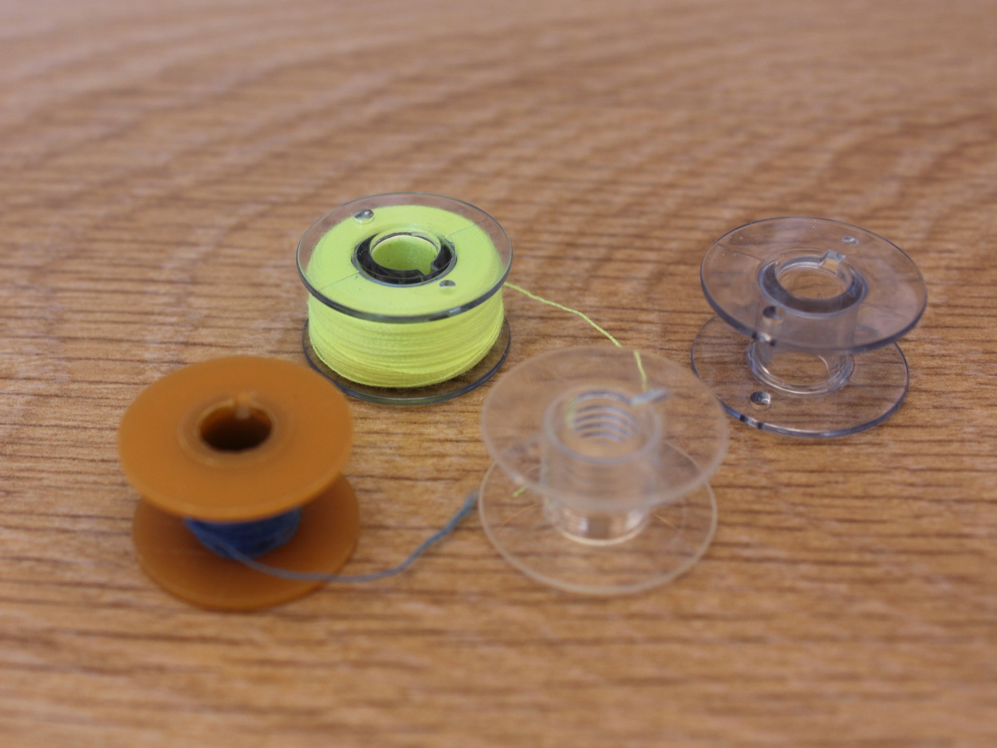 Шпульки для швейной машины